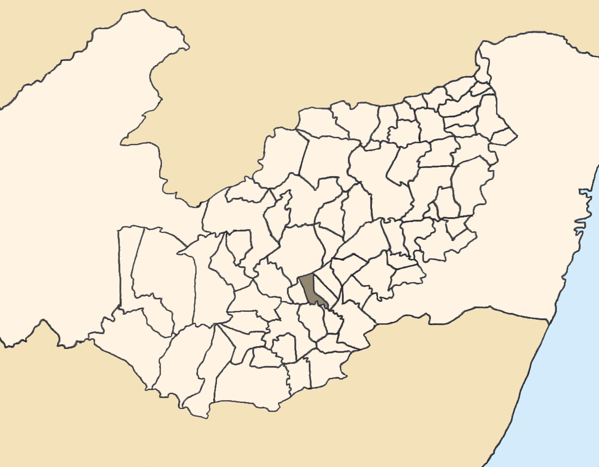 Mapa da mesorregião Agreste de Pernambuco (Brasil) subdivida em municípios. Em destaque, o município de Jupi. Map of the brazilian state of Pernambuco (mesorregião Agreste) showing the city of Jupi. Imagem tratada com o GIMP. Image made with GIMP.